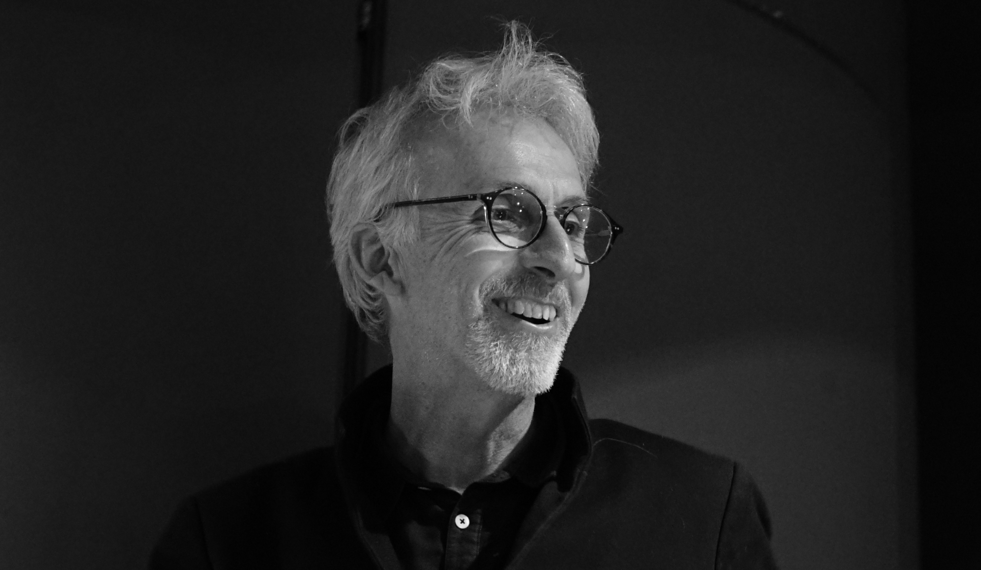 en conférence à Reims.